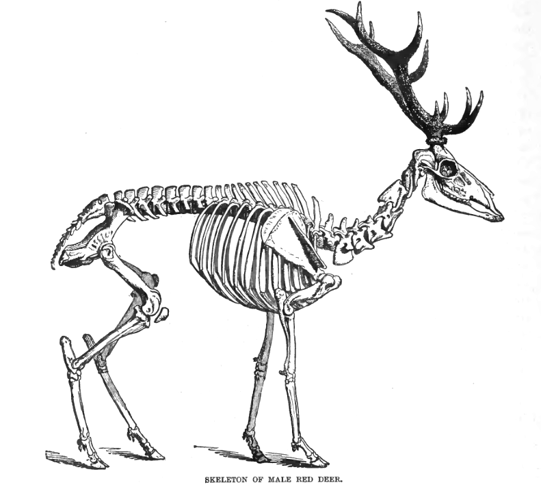 Red deer skeleton